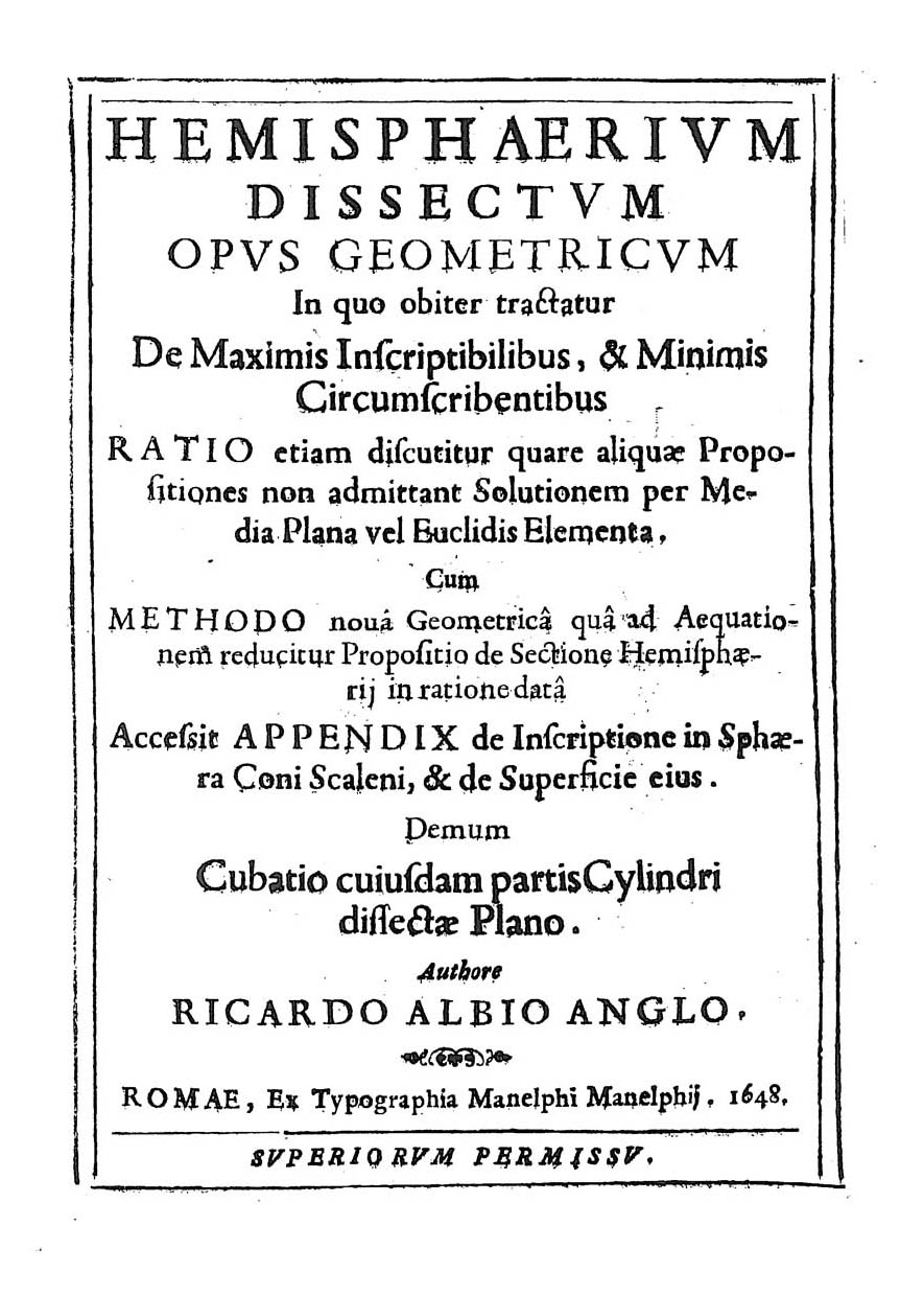 Hemisphaerium dissectum opus geometricum in quo obiter tractatur de maximis inscriptibilibus, & minimis circumscribentibus ratio etiam discutitur quare aliquae propositiones non admittant solutionem per media plana vel Euclidis elementa. ... Accessit Appendix de inscriptione in sphaera coni scaleni, & de superficie eius. Demum cubatio cuiusdam partis cylindri dissectae plano. Authore Ricardo Albio Anglo. - Romae : ex typographia Manelphi Manelphij, 1648. - [12], 294, [2] p. : ill. ; fol. .